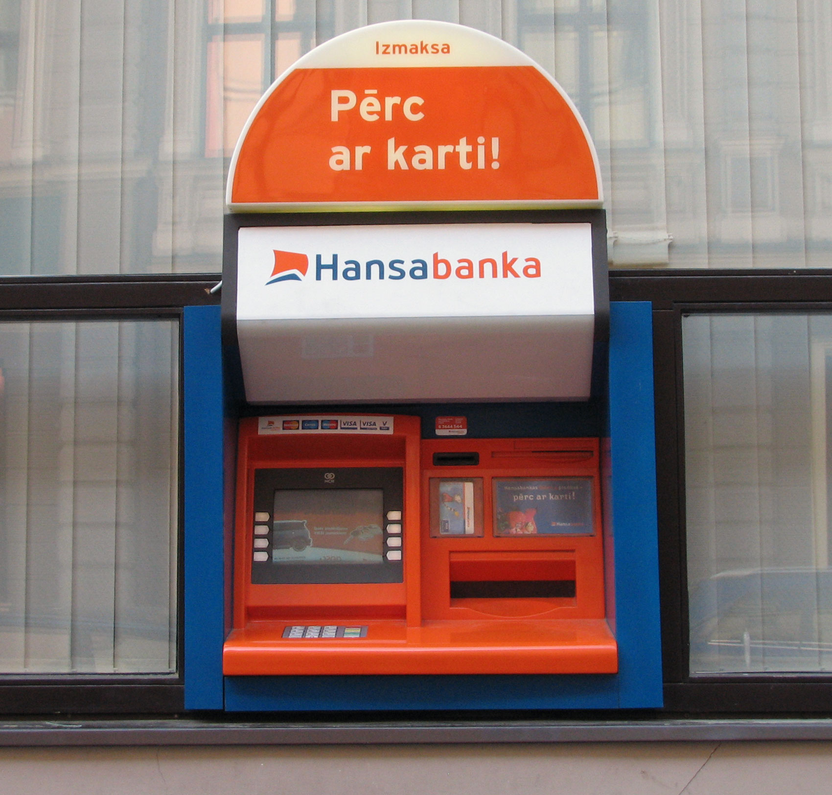 A Hansabanka ATM in Riga, Latvia.